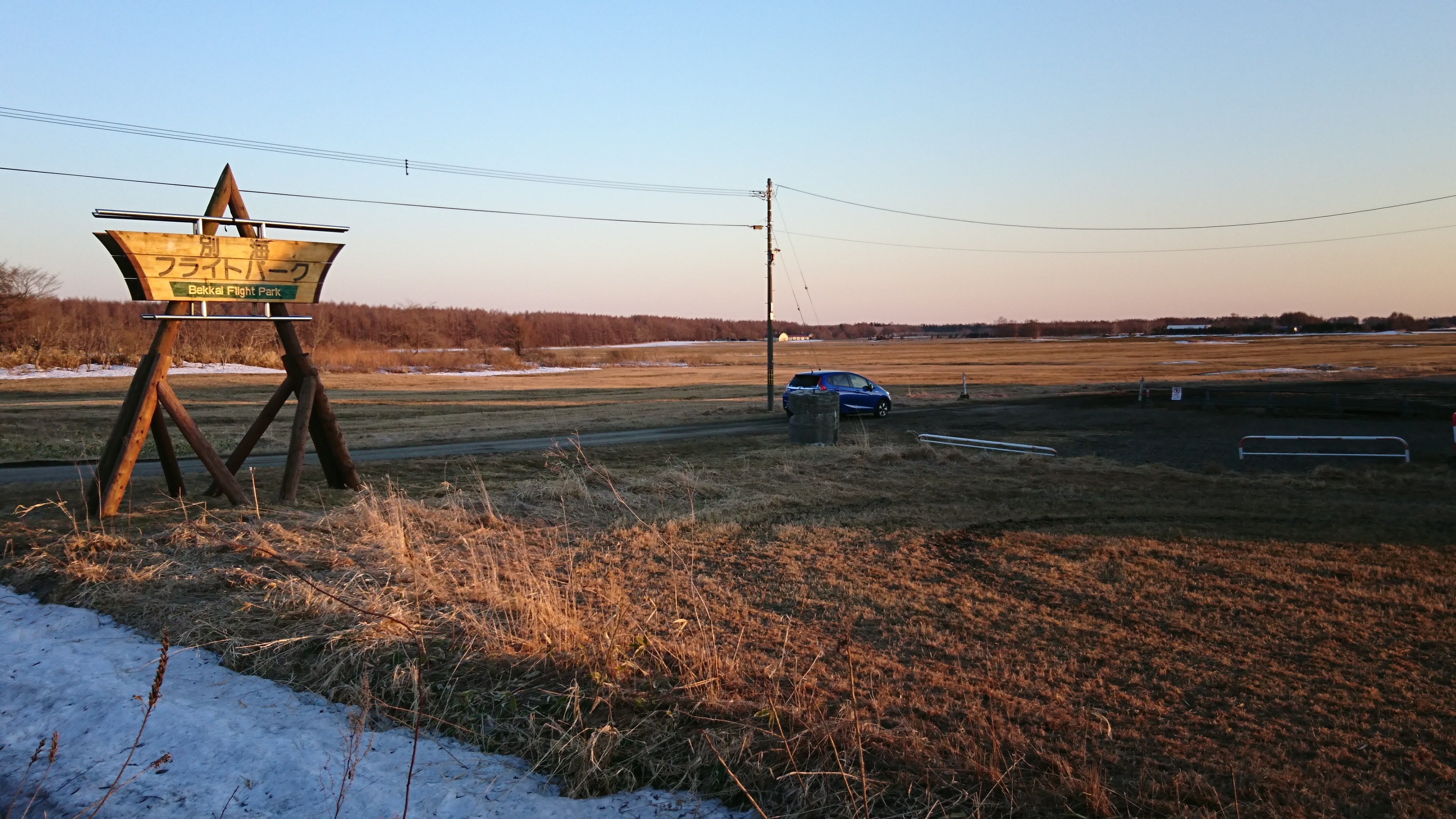 別海フライトパーク